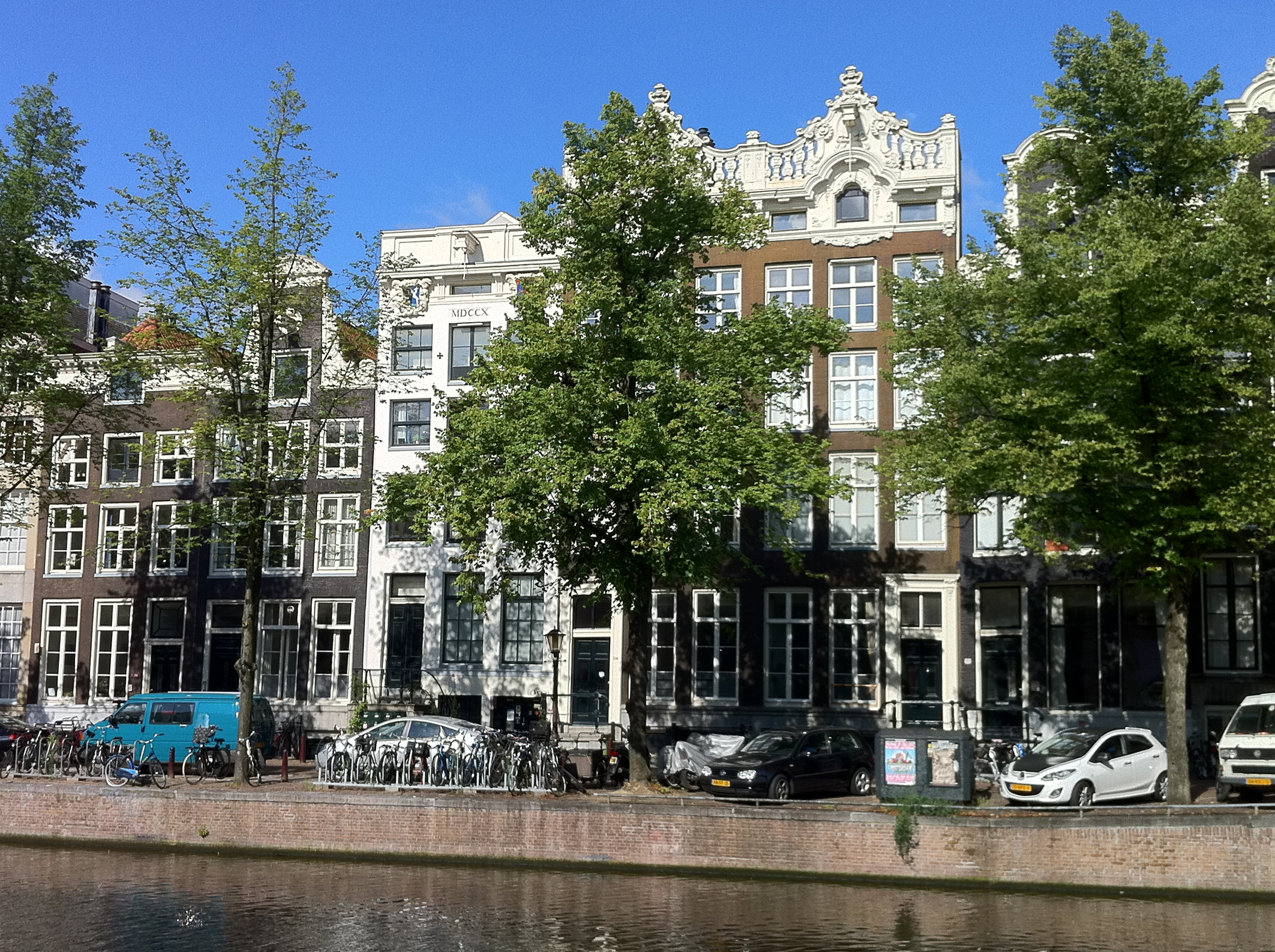 Groote Keijser, Keizersgracht v.r.n.l. 242-252 Amsterdam Netherlands in juli 2011, voormalig bolwerk kraakbeweging, nu verhuurd als sociale woningbouw door Ymere